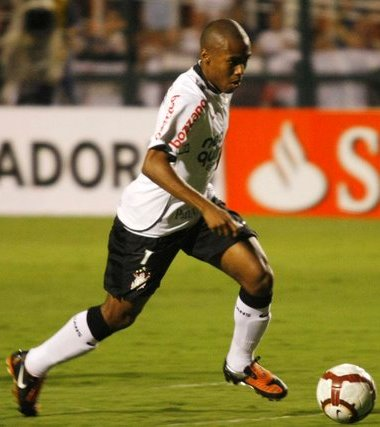 Elias em ação no Corinthians em 2010.